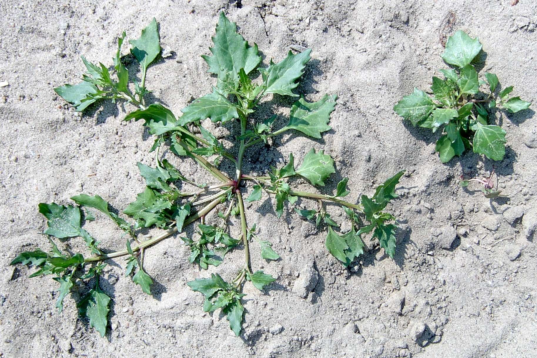 Chenopodium rubrum, Odra river banks, Kaleńsko, NW Poland